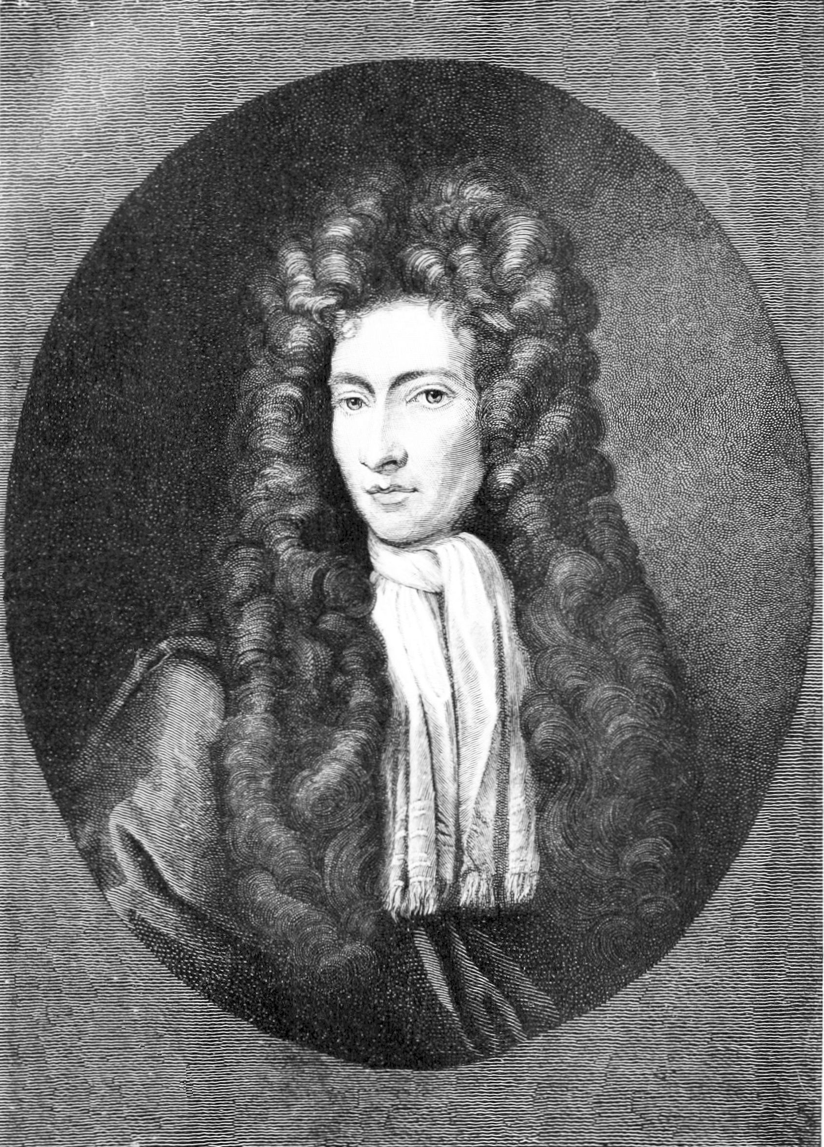 Robert Boyle